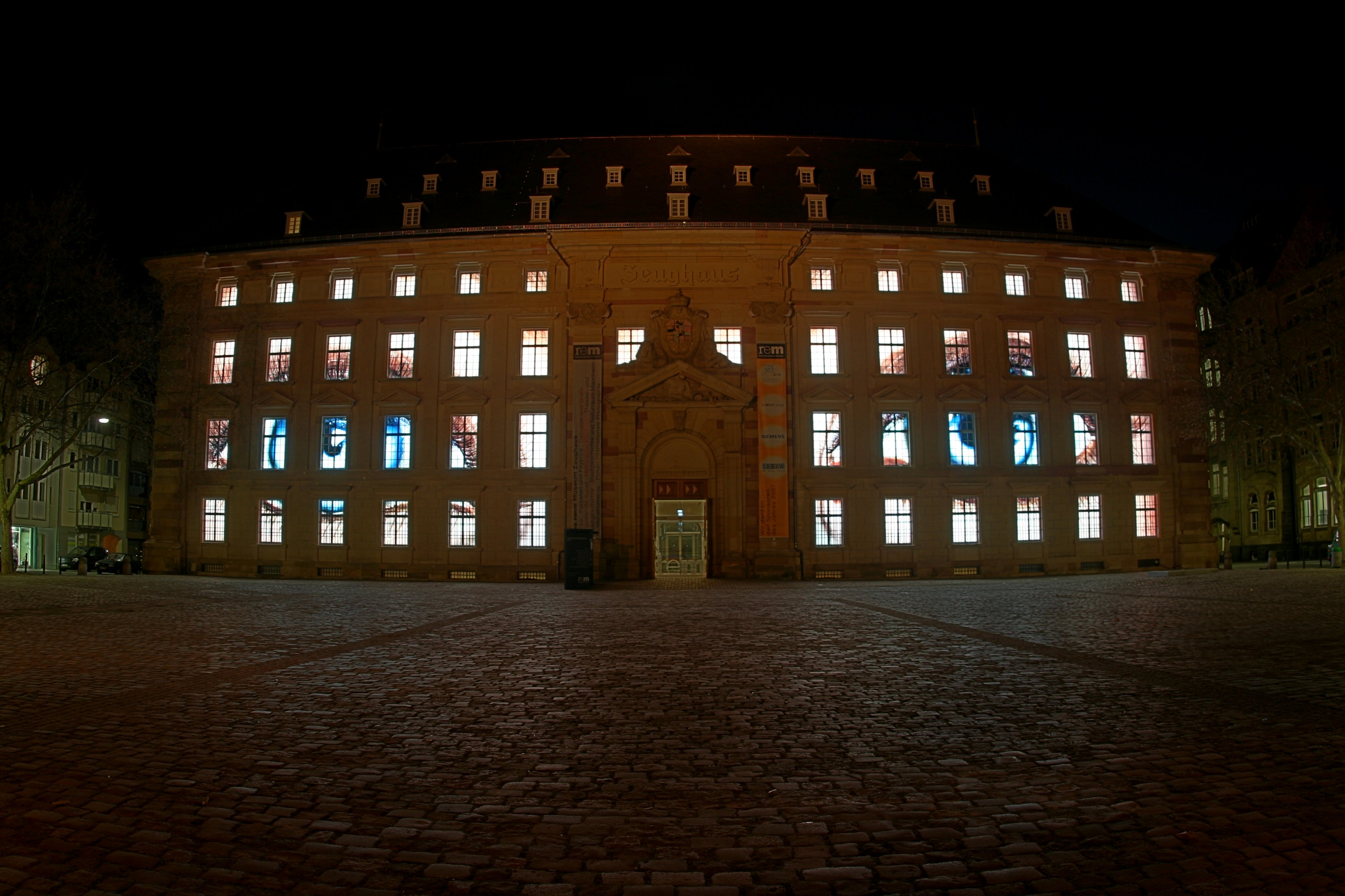 Zeughaus Museum at night with illuminated windows, Mannheim, Germany Zeughaus (Mannheim)